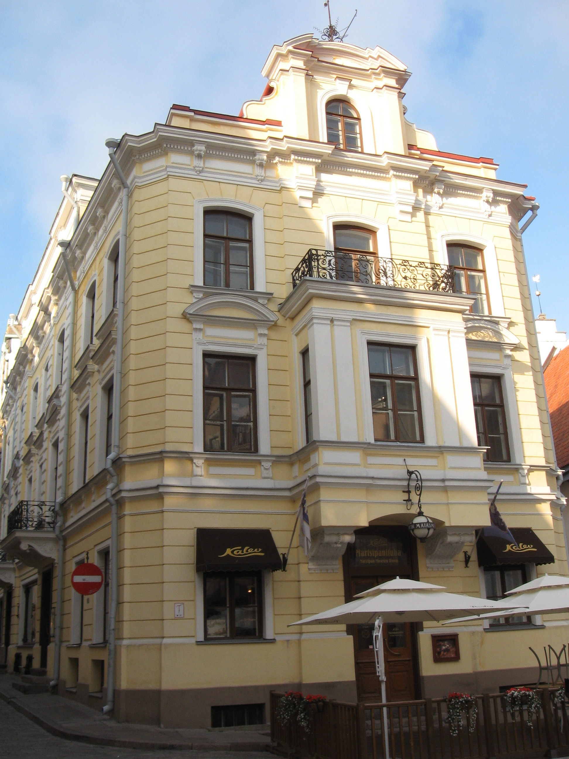 Tallinn, Pikk tn 16